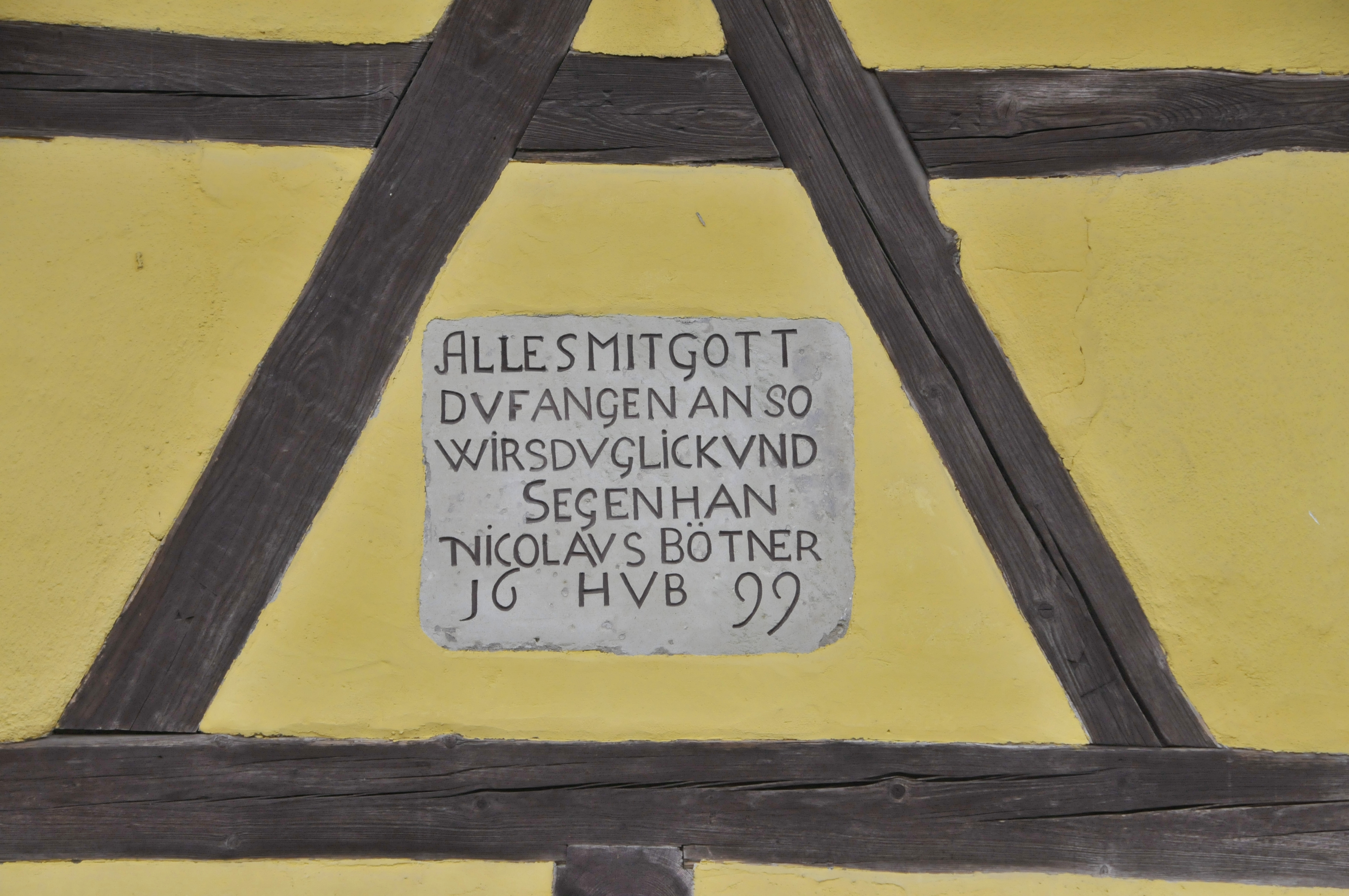 Inschrift an der Hauswand der Mühle in Großhettstedt